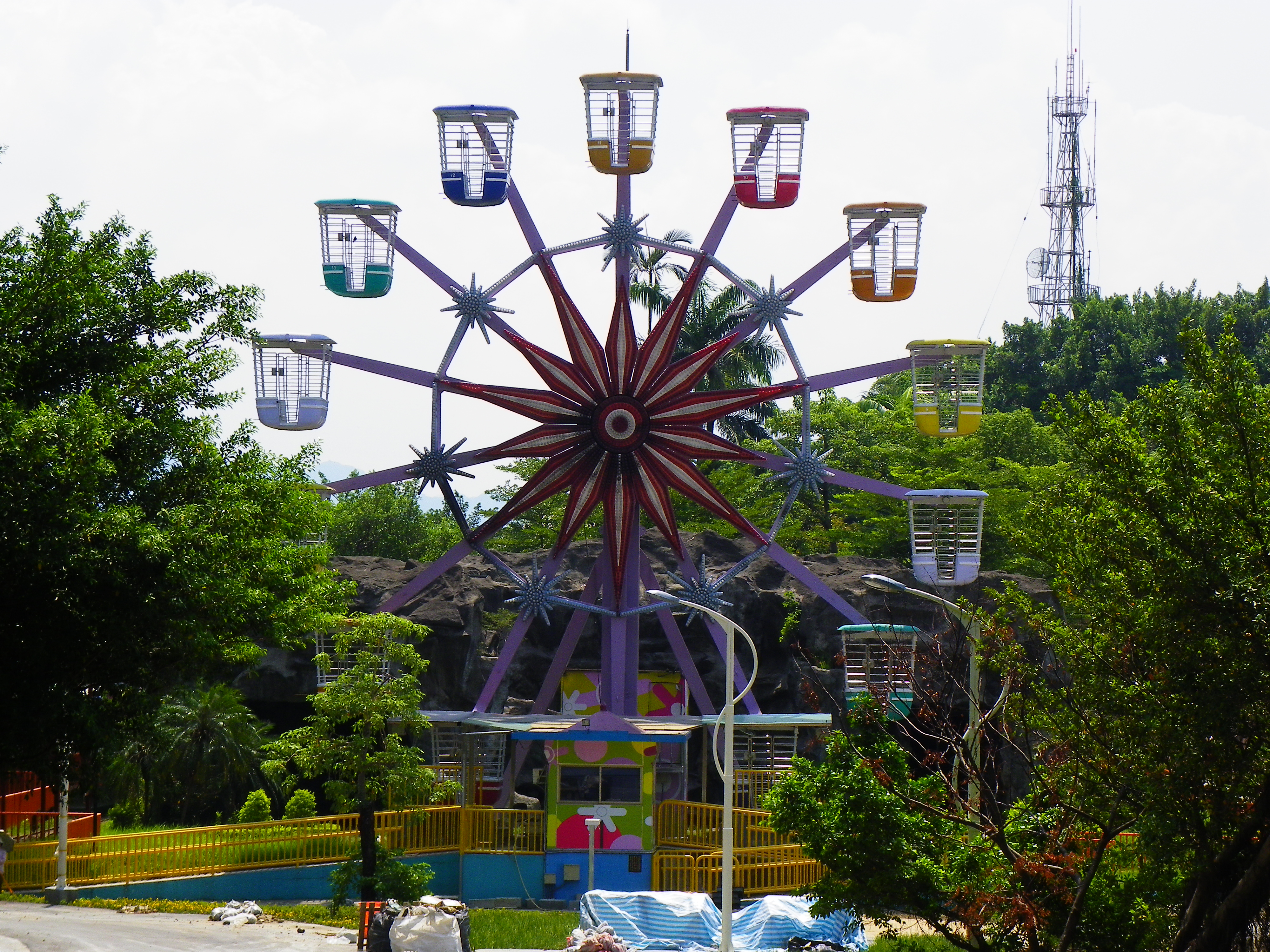 臺北市立兒童育樂中心的摩天輪。